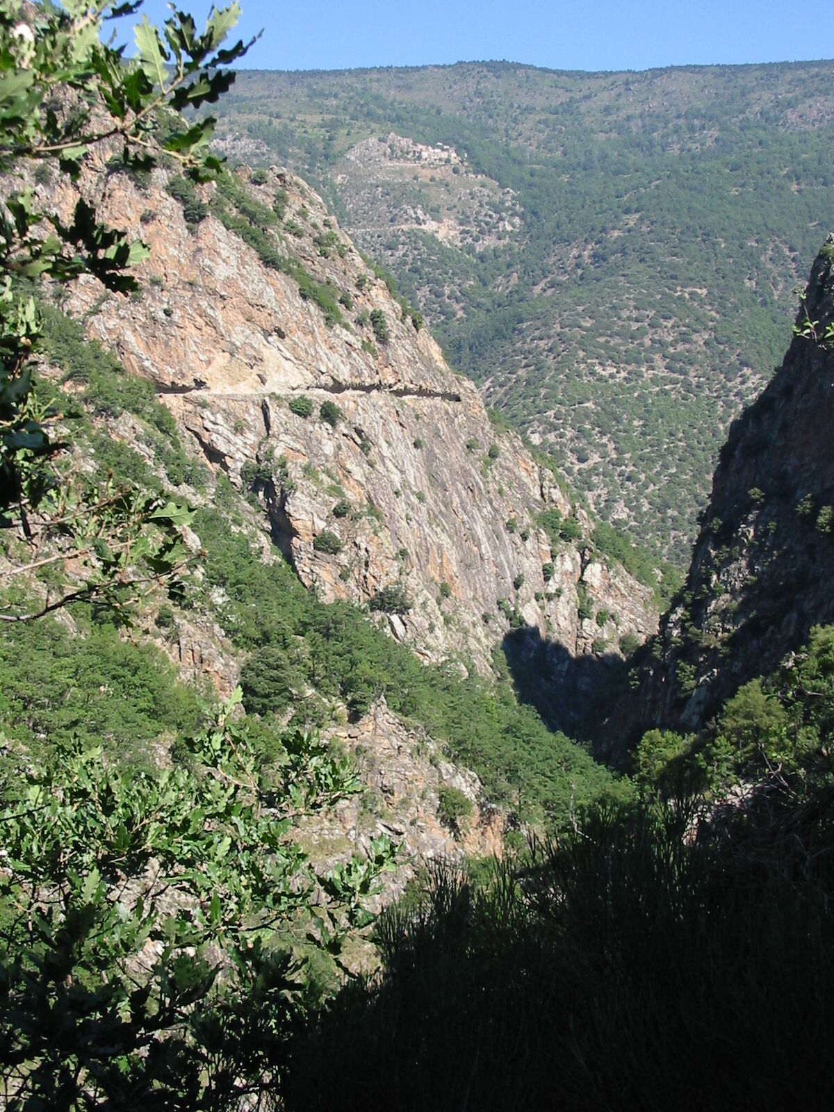 Gorges de la Carança: vue vers la corniche et la vallée de la Têt, Pyrénées-Orientales, France